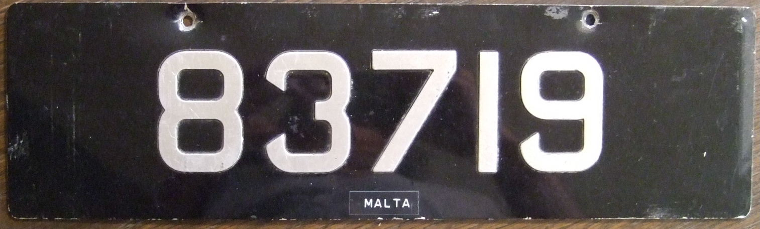 MALTA passenger 1960's